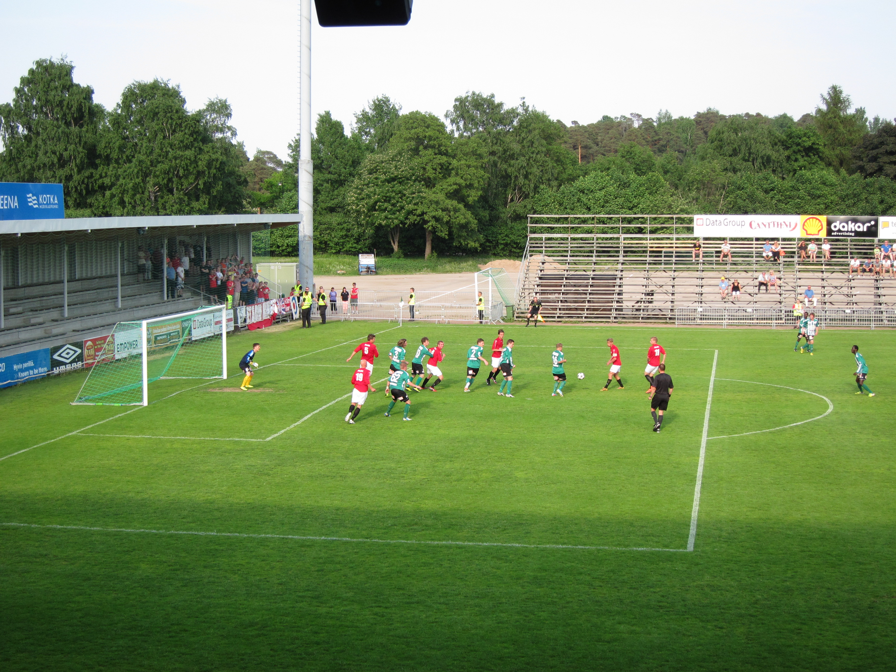 Ottelu KTP-HIFK Kakkosen itälohkossa 5. kesäkuuta 2013 Kotkassa Arto Tolsa Areenalla.